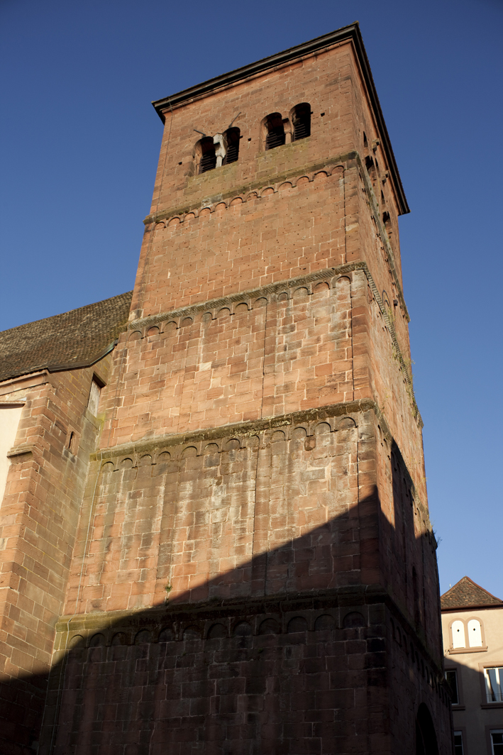 Clocher roman de l'église paroissiale de Saverne